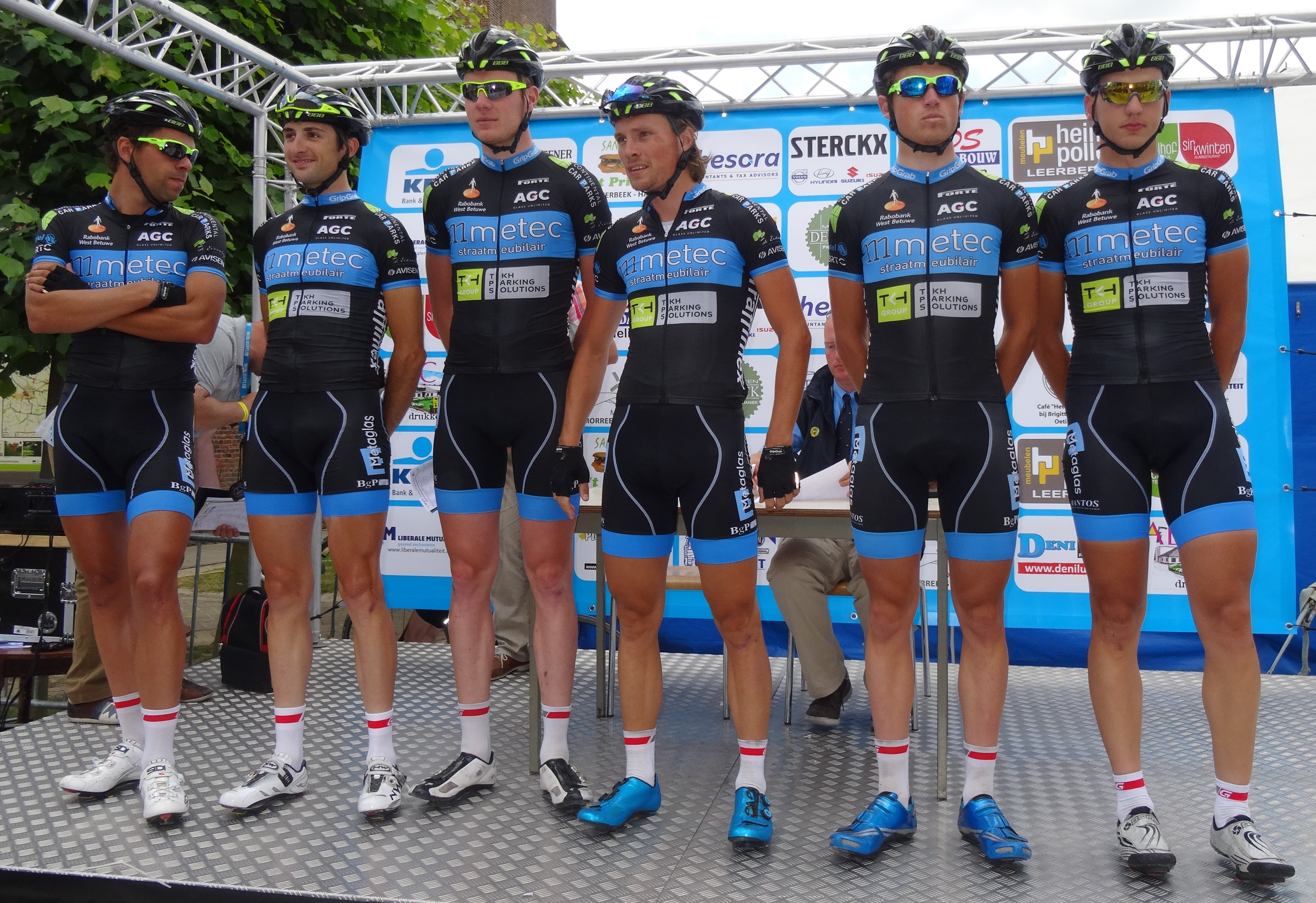 Reportage photographique réalisé le mercredi 25 juin à l'occasion du départ et de l'arrivée de l'Internationale Wielertrofee Jong Maar Moedig 2014 à Oetingen (Gooik), Belgique.